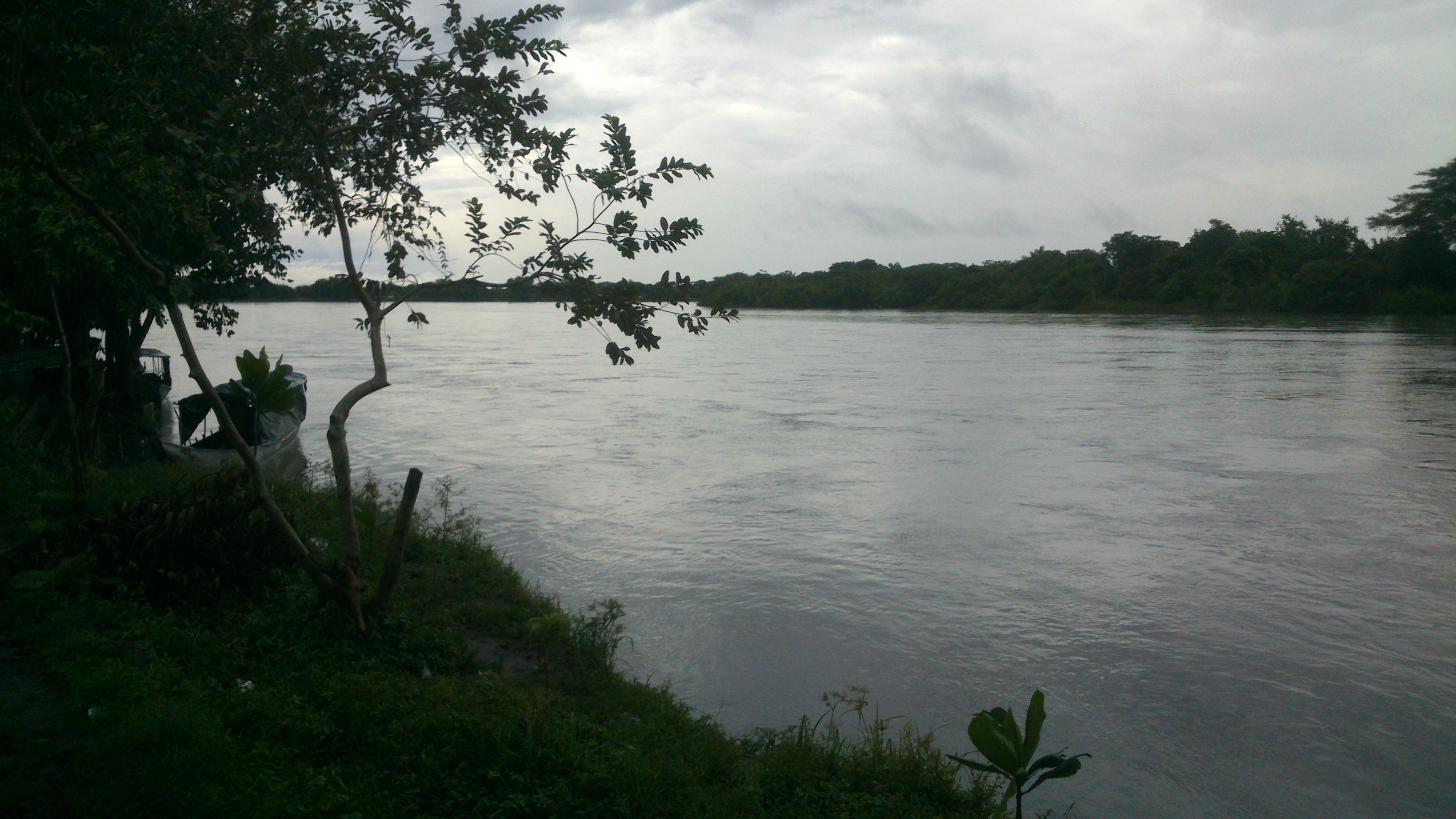 Ubicación: PUERTO RONDON, ARAUCA